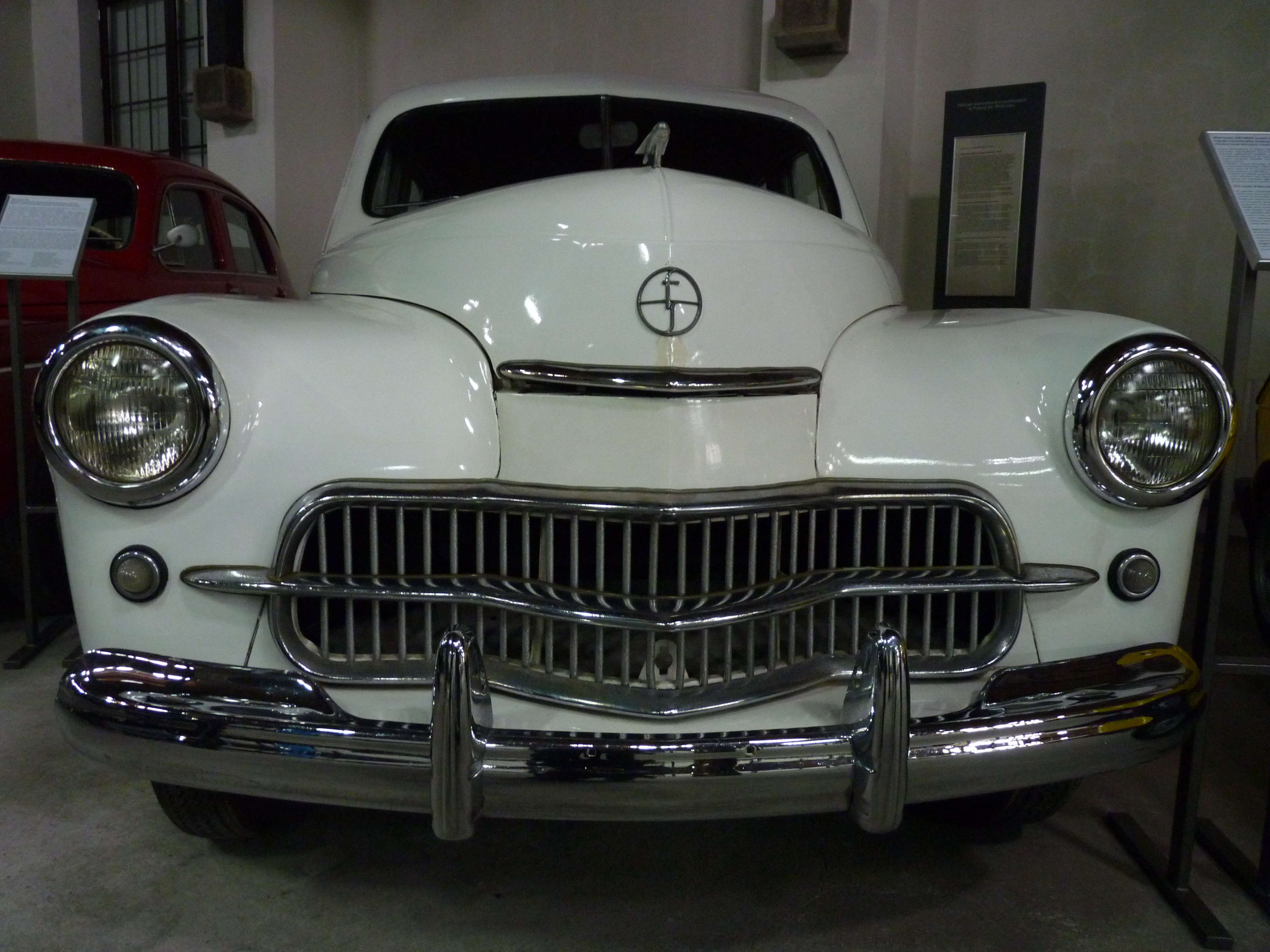 FSO Warszawa M-20-57 in Muzeum Inżynierii Miejskiej in Kraków.